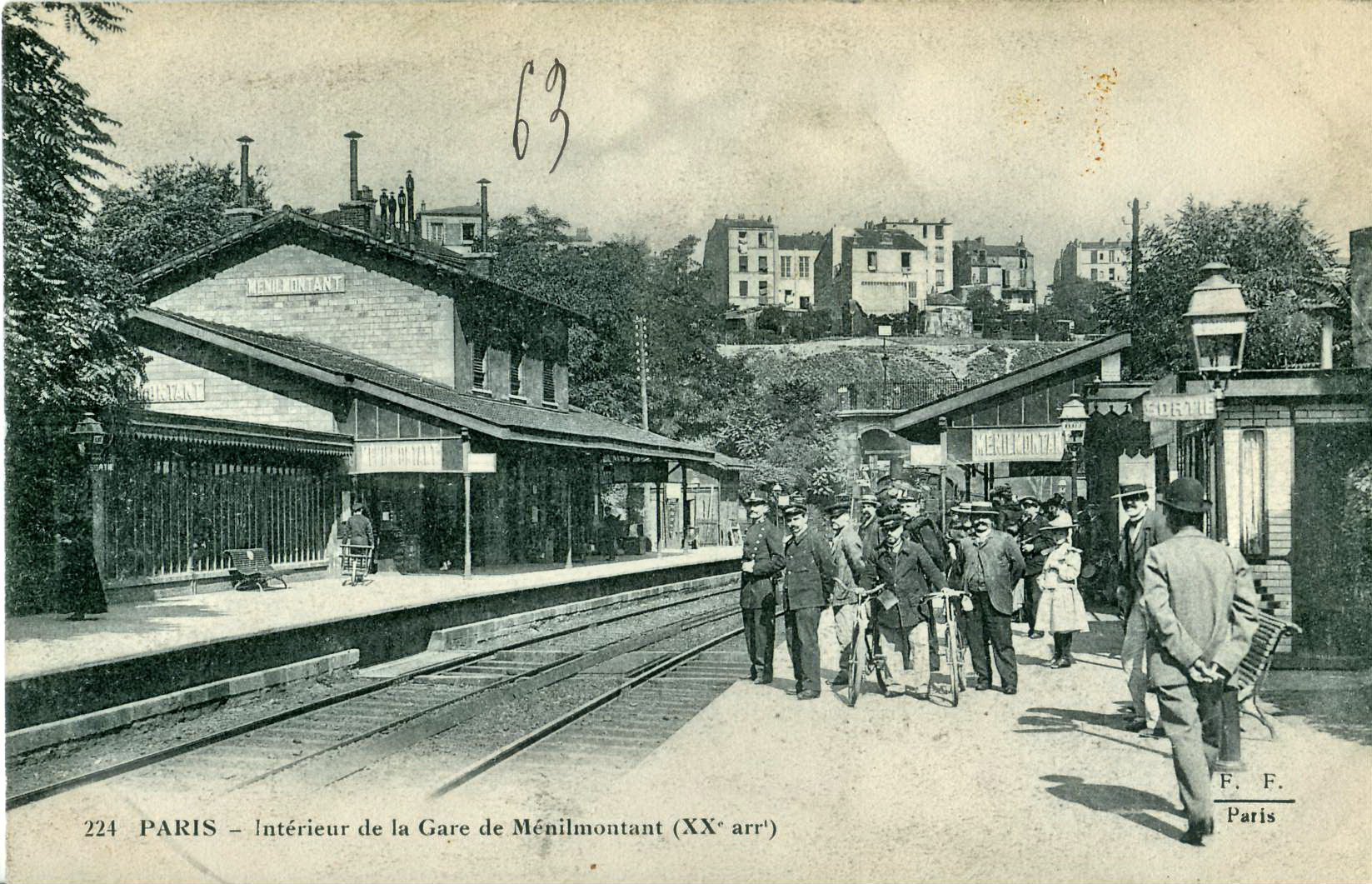 Carte postale ancienne éditée par FF (Fleury) N° 224 Paris : Intérieur de la Gare de Ménilmontant sur la Ligne de Petite Ceinture